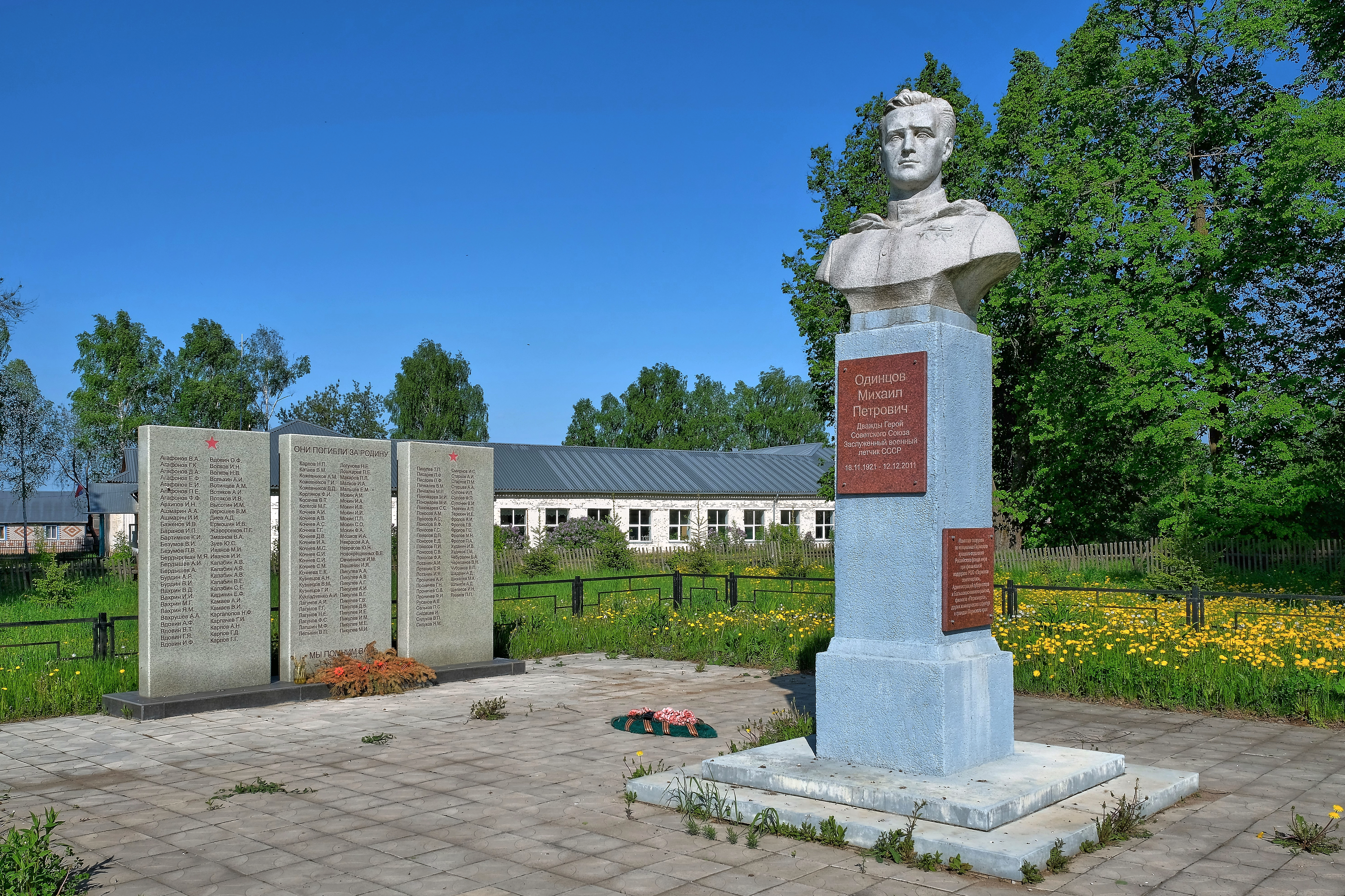 Воинский мемориал Храм в селе Полозово, Большесосновский район Пермского края